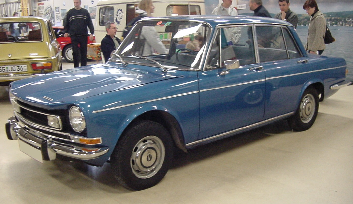 Simca 1301 bei der Retro Classics in Stuttgart